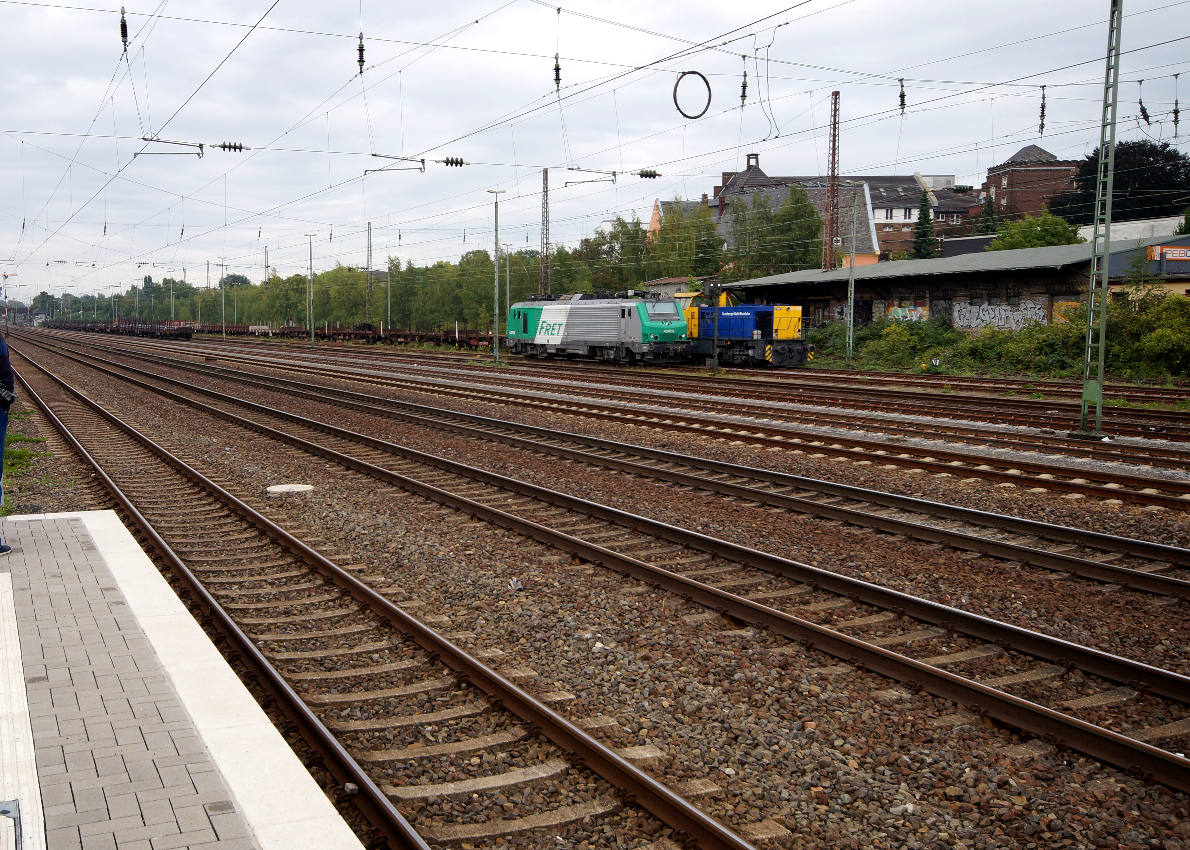 Güterbahnhof des Bahnhofs Düsseldorf-Rath